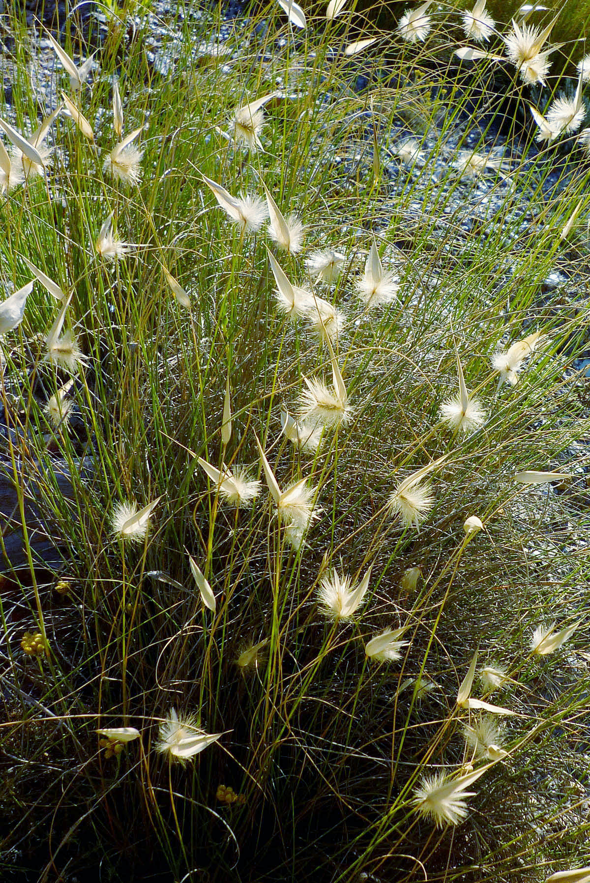 Albardín (Lygeum spartum) en el Monte San Julián de Cartagena (España).